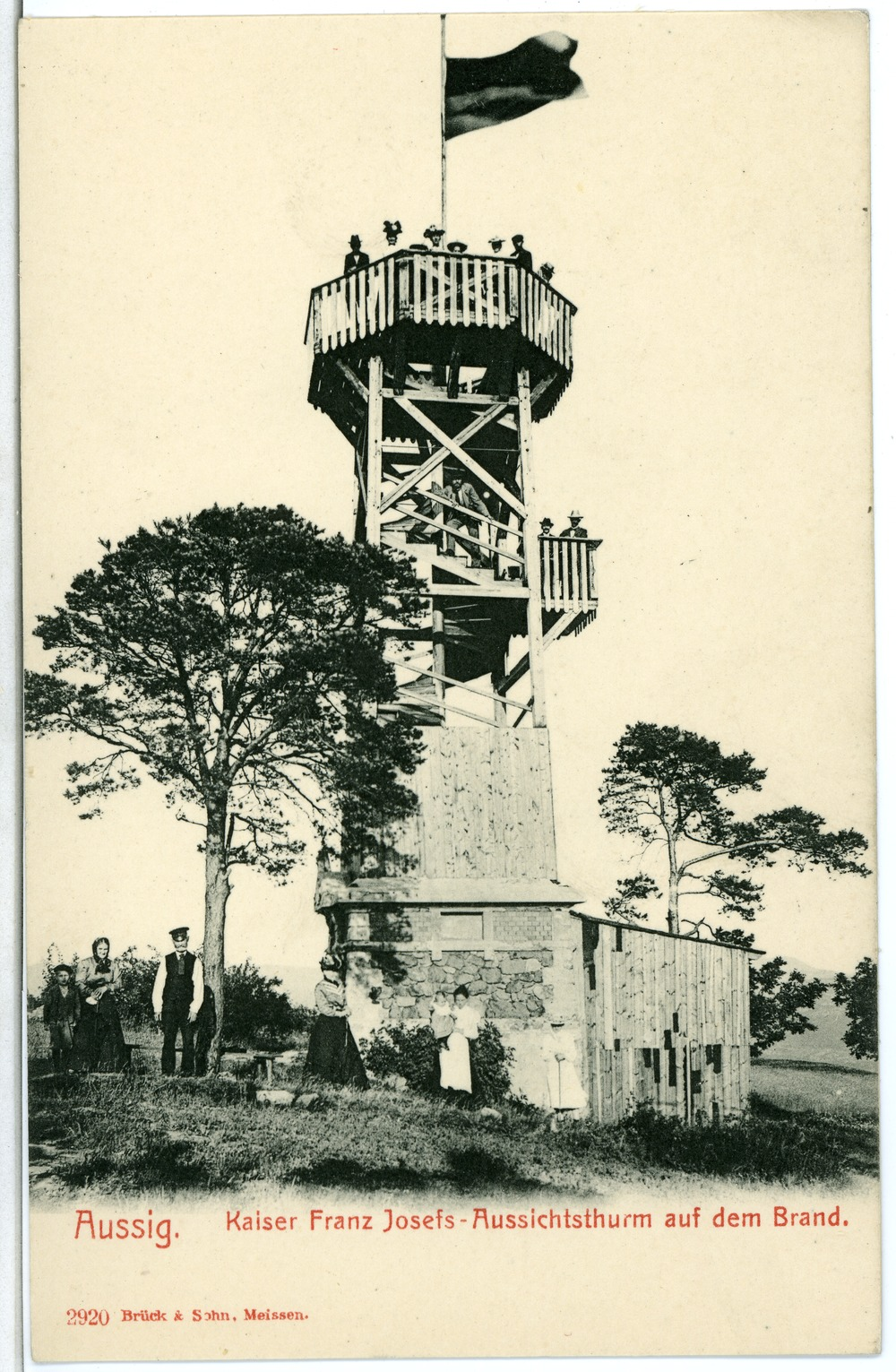 Aussig; Kaier Franz-Josefs-Aussichts-Turm auf dem Brand This postcard is from publisher Brück & Sohn in Meißen ( postcard has a unique number 02920 and is available in a higher resolution at the publisher. This images was uploaded in a cooperation project between Wikipedians and the publisher.